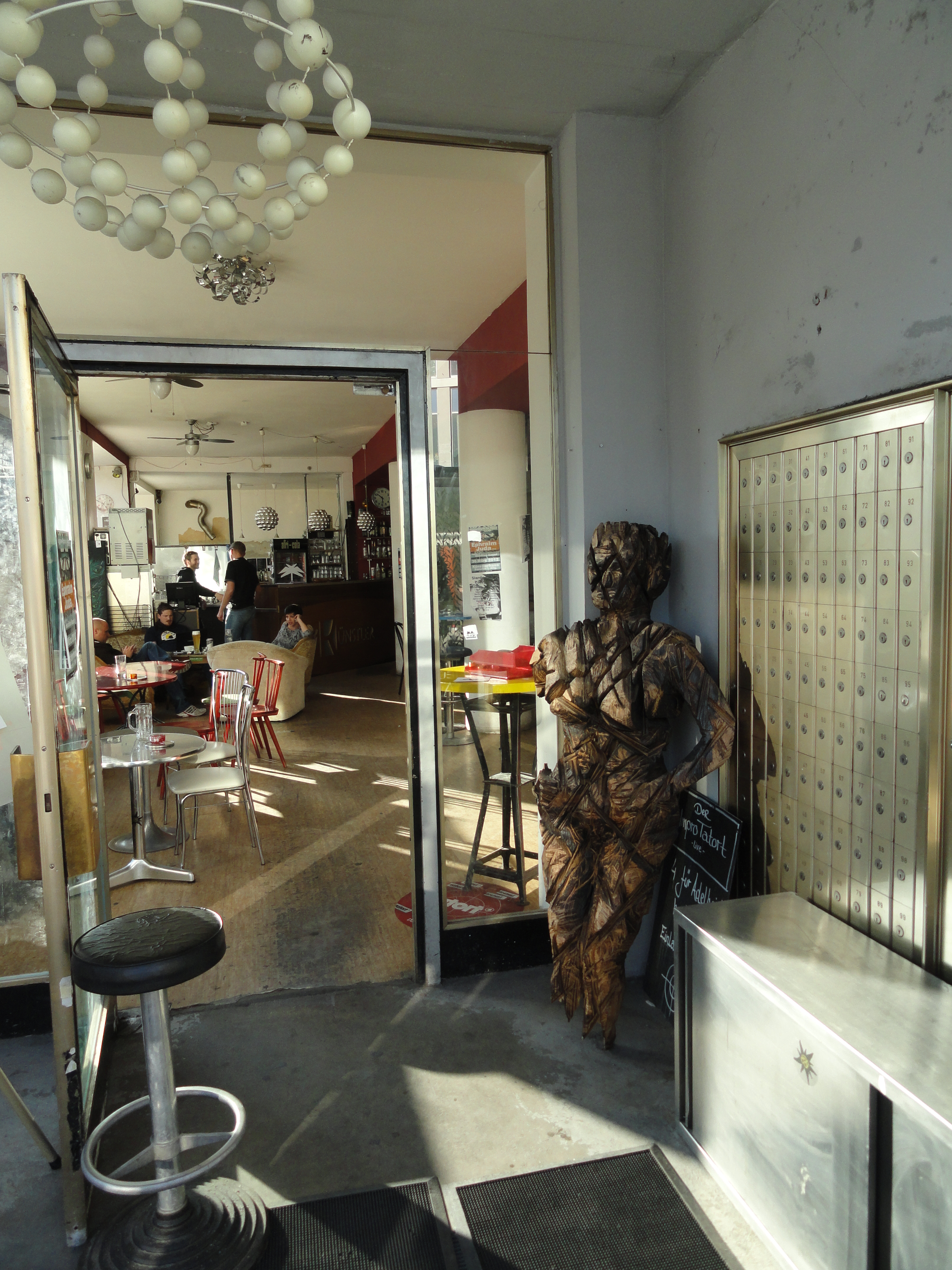 Künsterhaus in Kempten; Einwurfkasten - Bankschließfächer - Bayerisches Wappen